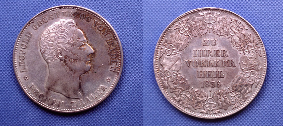 Badischer Kronentaler geprägt anlässlich der Gründung des Deutschen Zollvereins